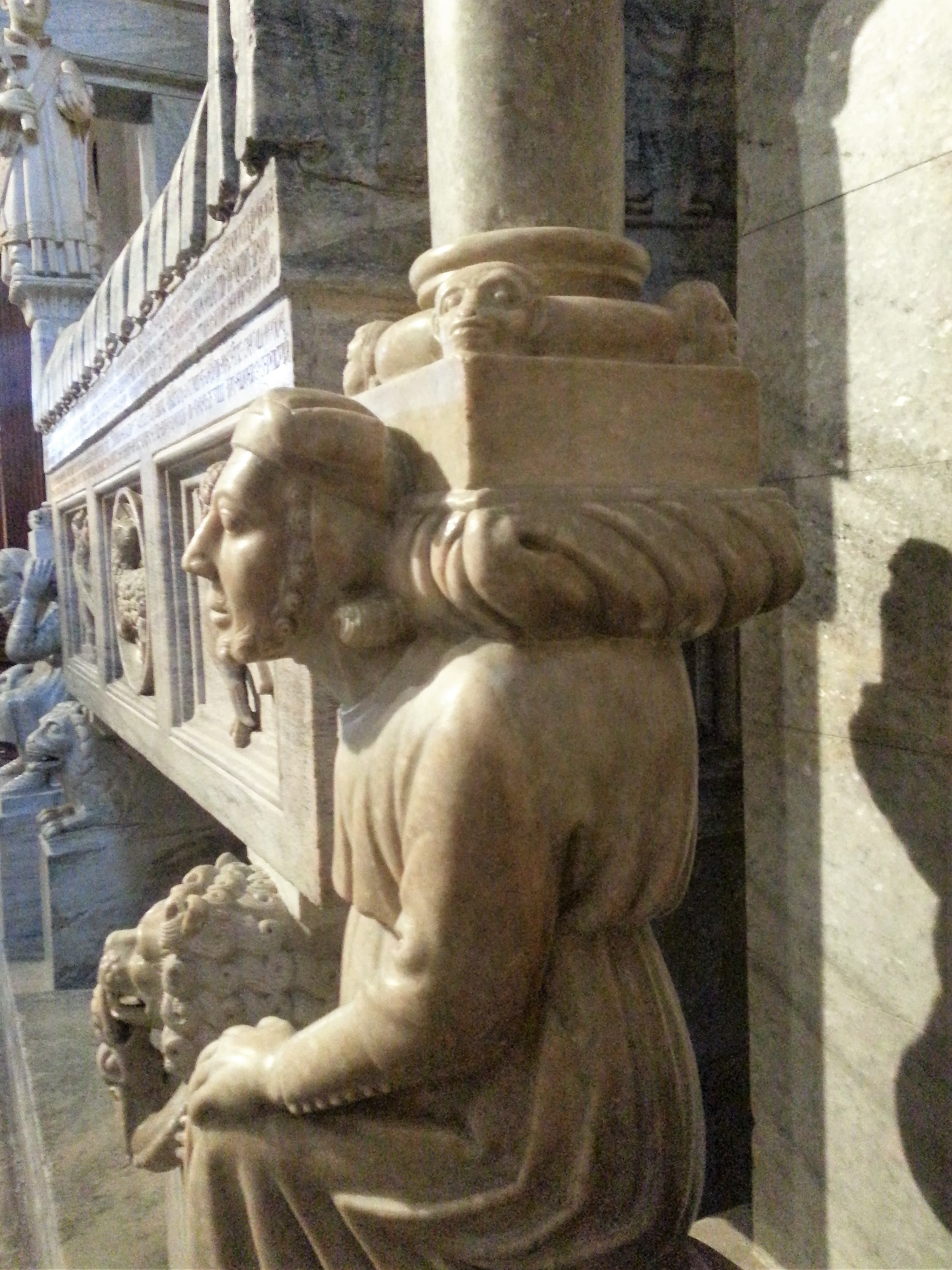 particolare del monumento funebre posto nella chiesa di santa Maria Maggiore